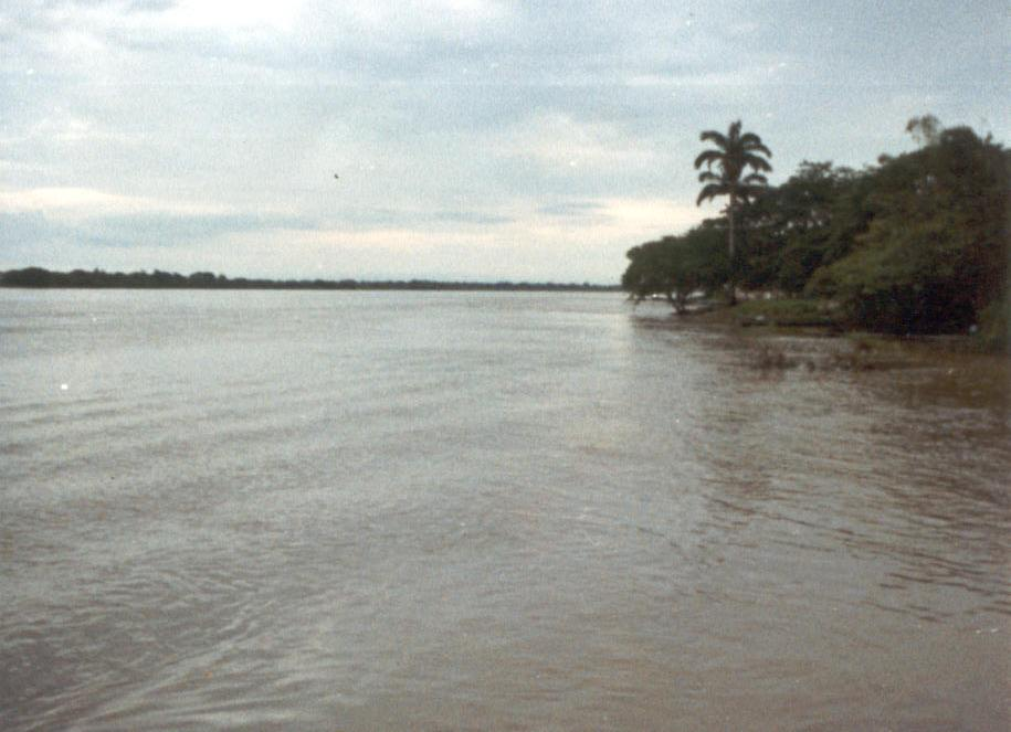 Ribera derecha del río Apure, junto a la población de El Samán. Foto tomada por el ingeniero Alberto J. Rodríguez Díaz en 1978. Con su autorización. Subida a Commons por Fev.